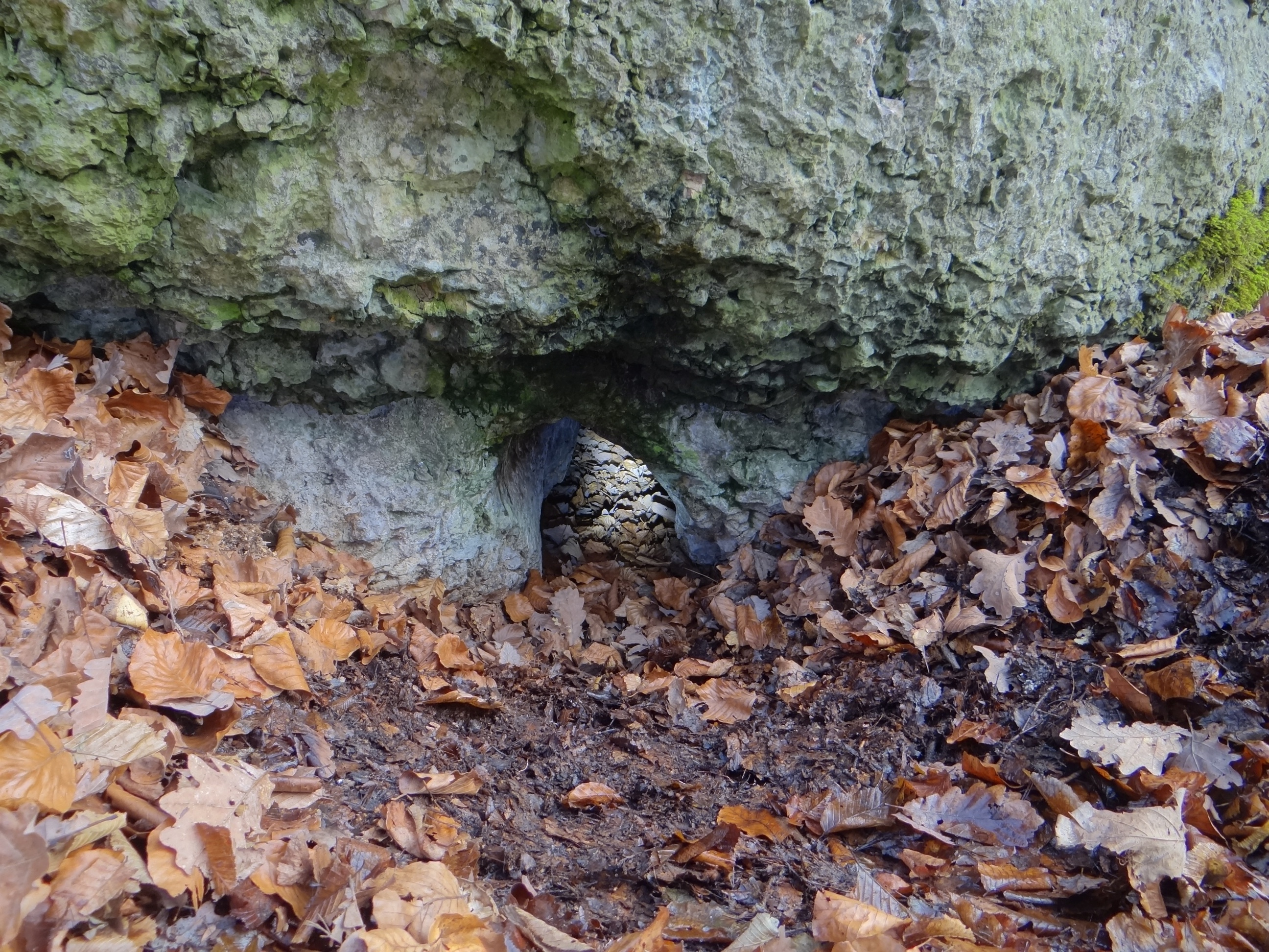 Jaskinia Księżycowa w wąwozie Półrzeczki na Wyżynie Krakowsko-Częstochowskiej